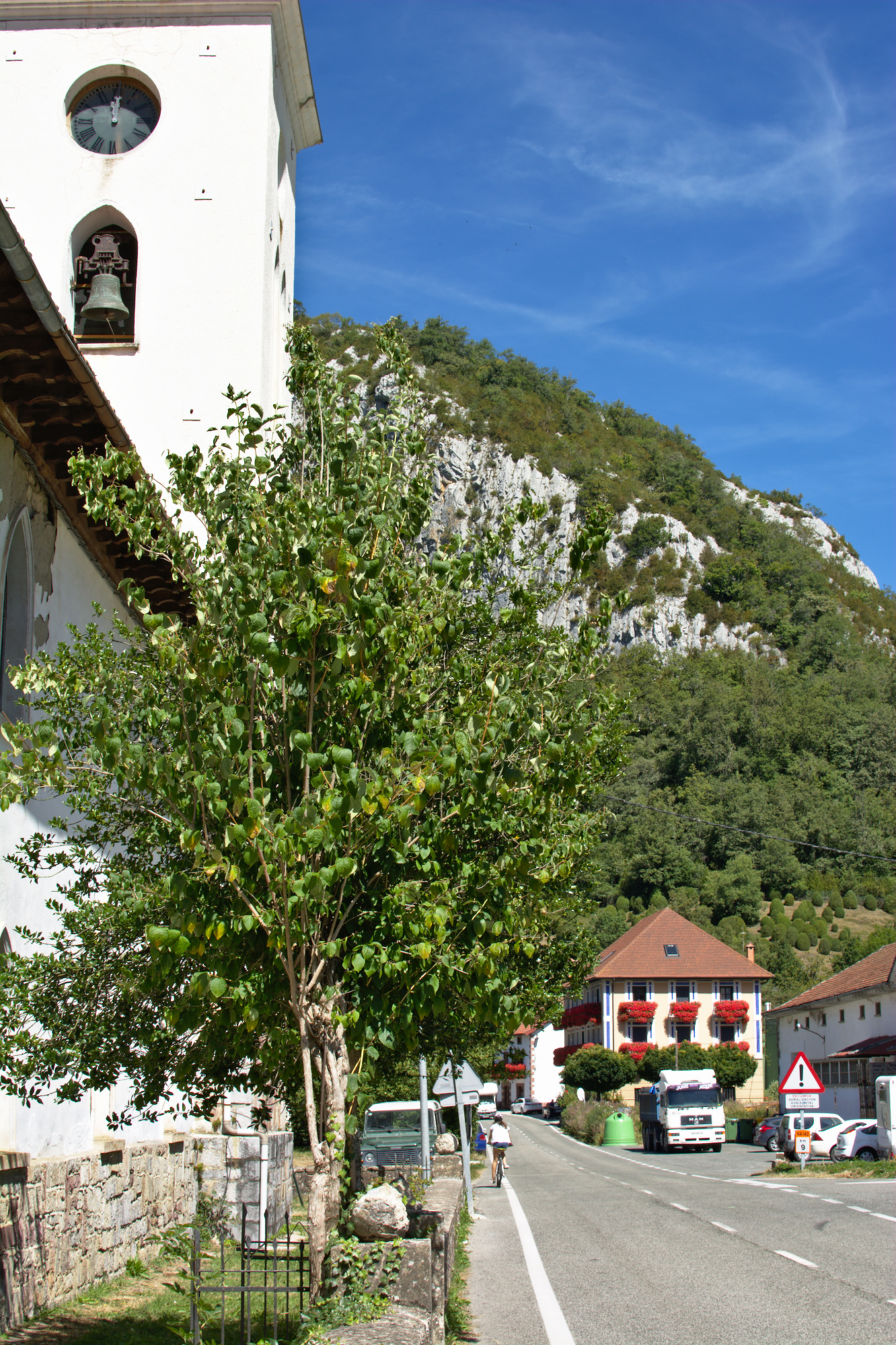 Arive